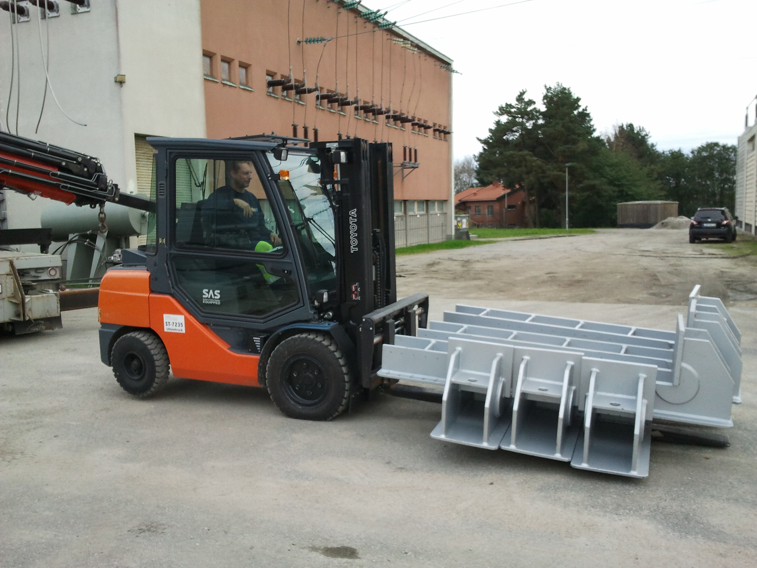 Varno dvigovanje bremena z viličarjem.